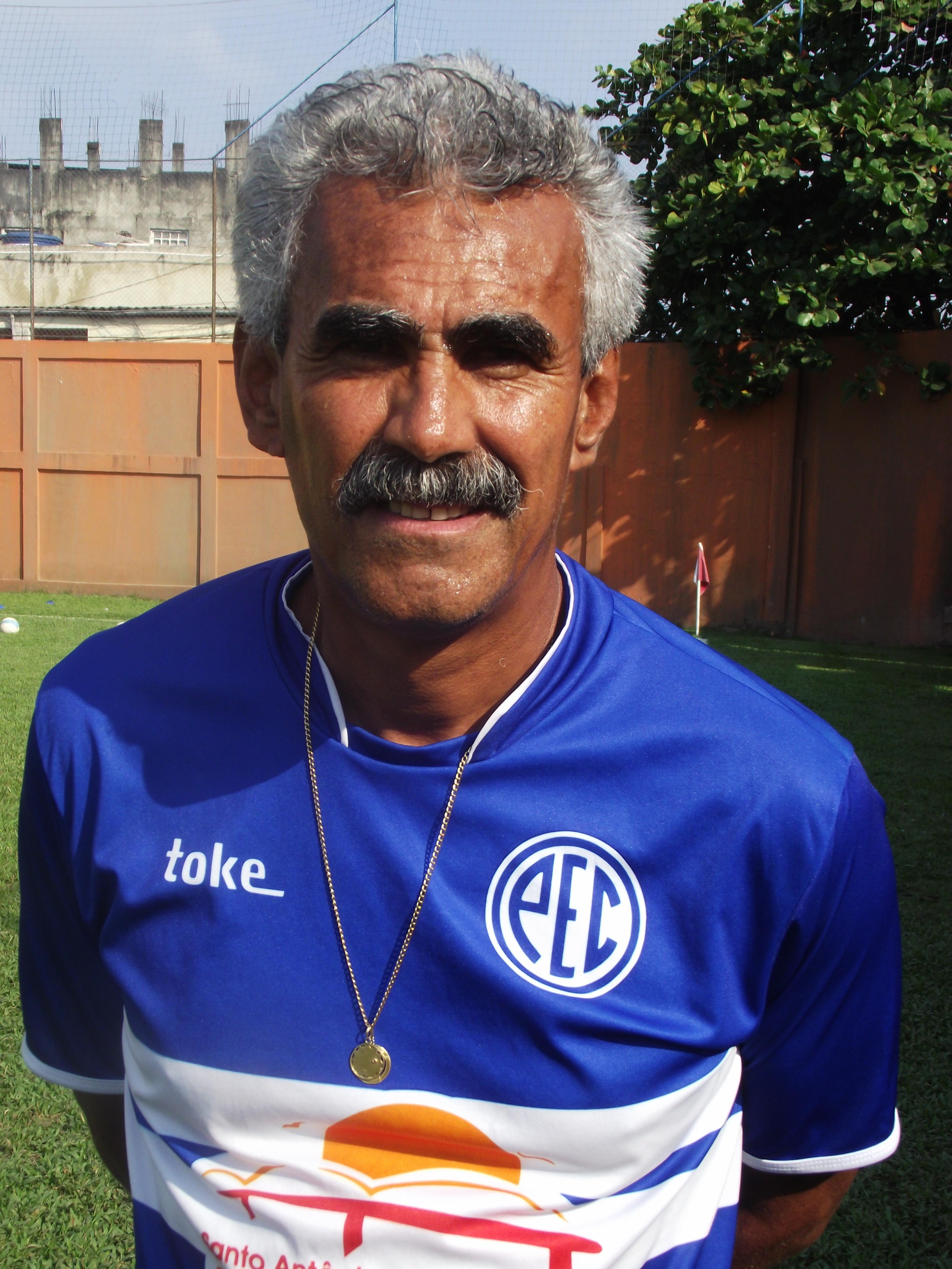 Emílson Peixinho, treinador do Paduano em 2012 e campeão em 1987 como jogador pelo mesmo clube da terceira divisão do RJ.